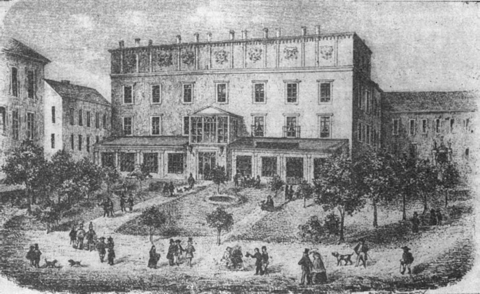 Kawiarnia Wintera w Pałacu Wielopolskich. Litografia "Czasu" 1860